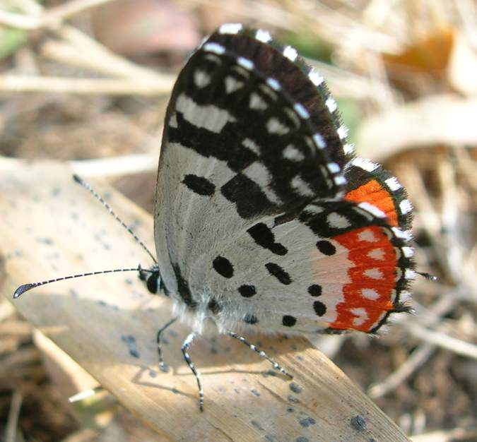 Red Pierrot underside Lycaenidae. Lepidoptera. Bandipur.